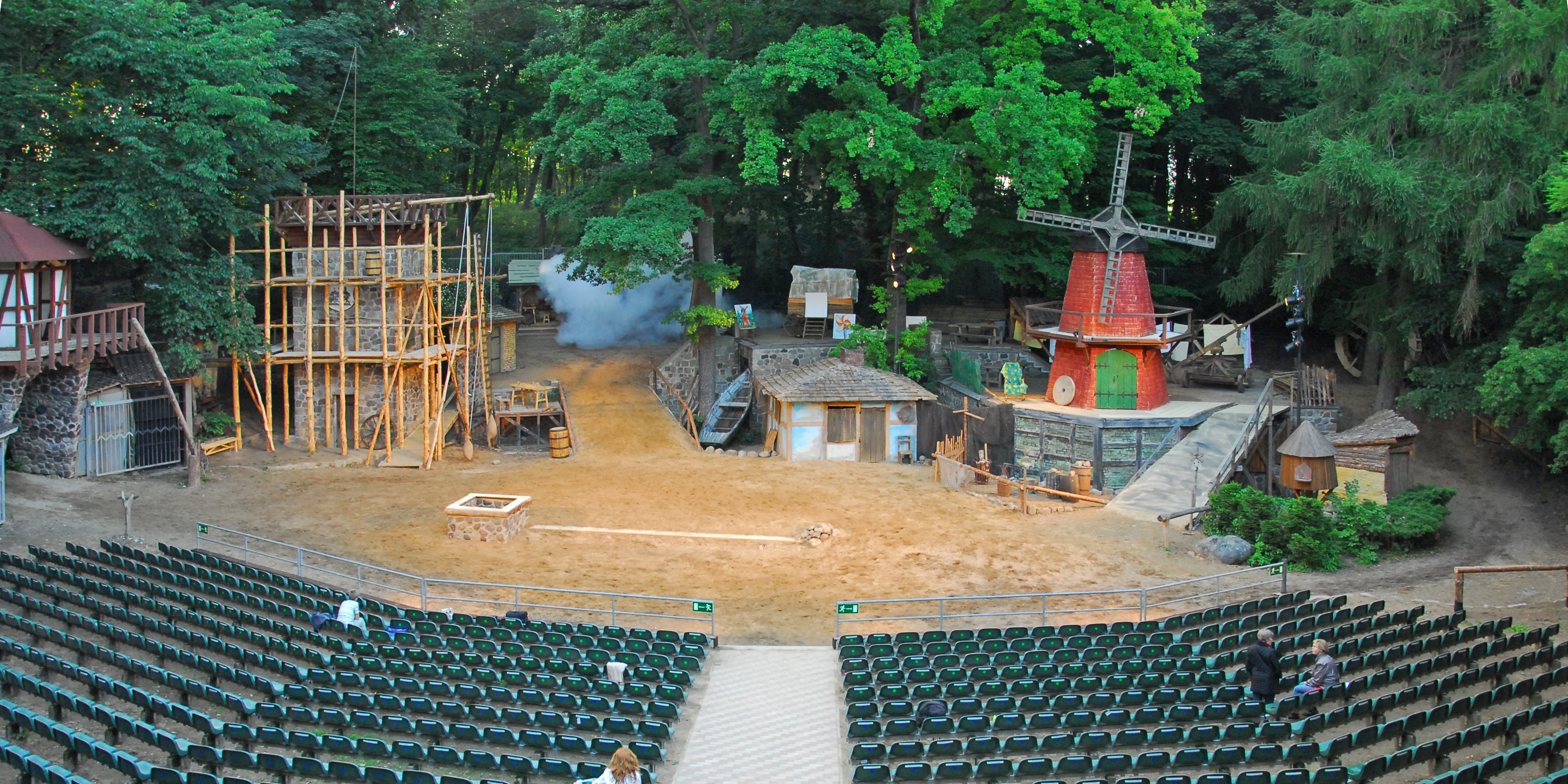 Bühne und Tribüne bei der Freilichtbühne Waren (Müritz) für die Aufführung der Müritz-Saga